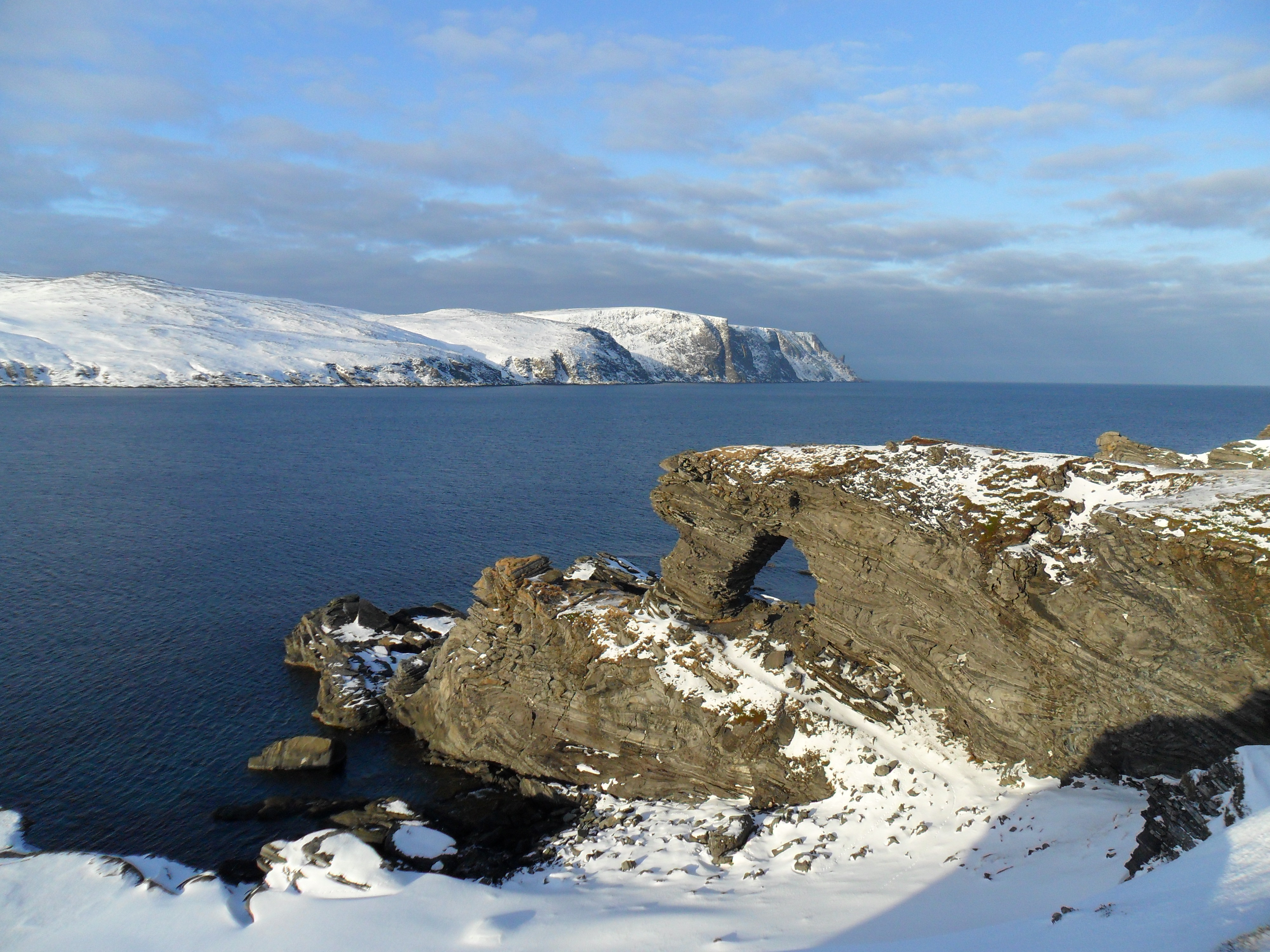 Kirkeporten sett mot Nordkapp.